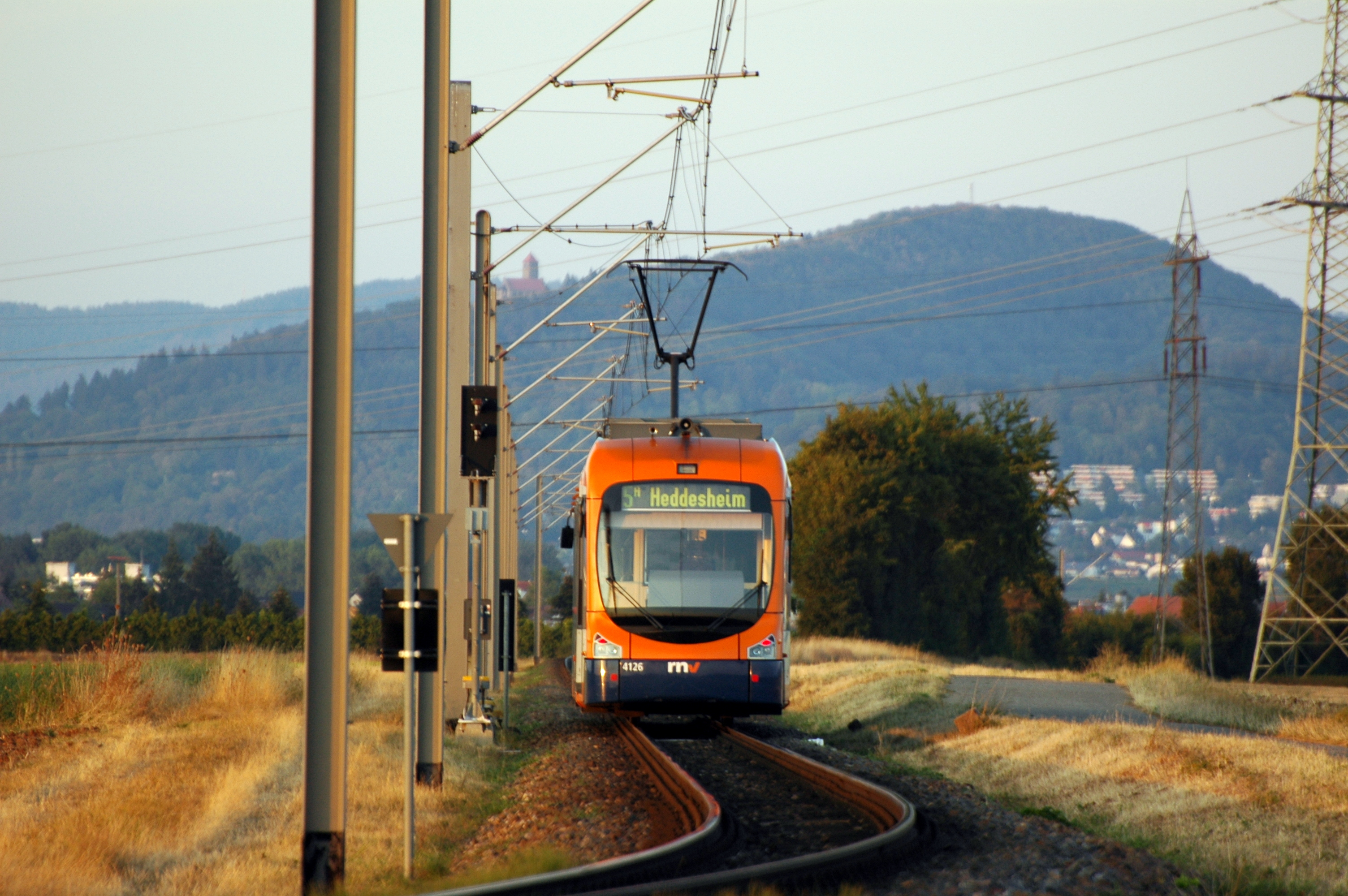 Heddesheim - Linie A5 zwischen Mannheim und Heddesheim - RNV 4126 - 2018-08-18